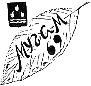 Qızıl payız musiqi həftəsinin Muğam-69 festivalının loqosu